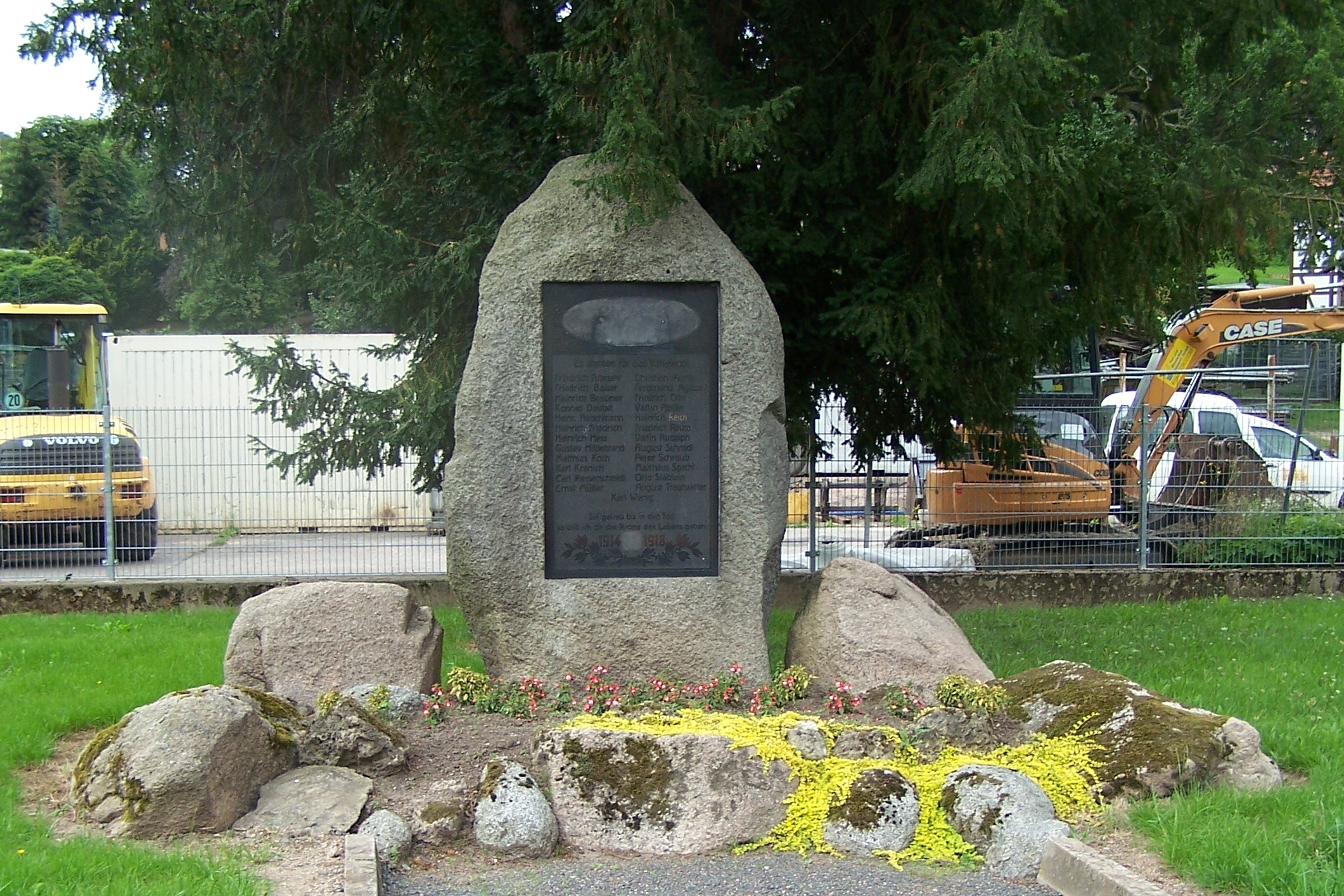 In der nördlichen Ortslage von Schweina trifft man auf das Gefallenendenkmal.